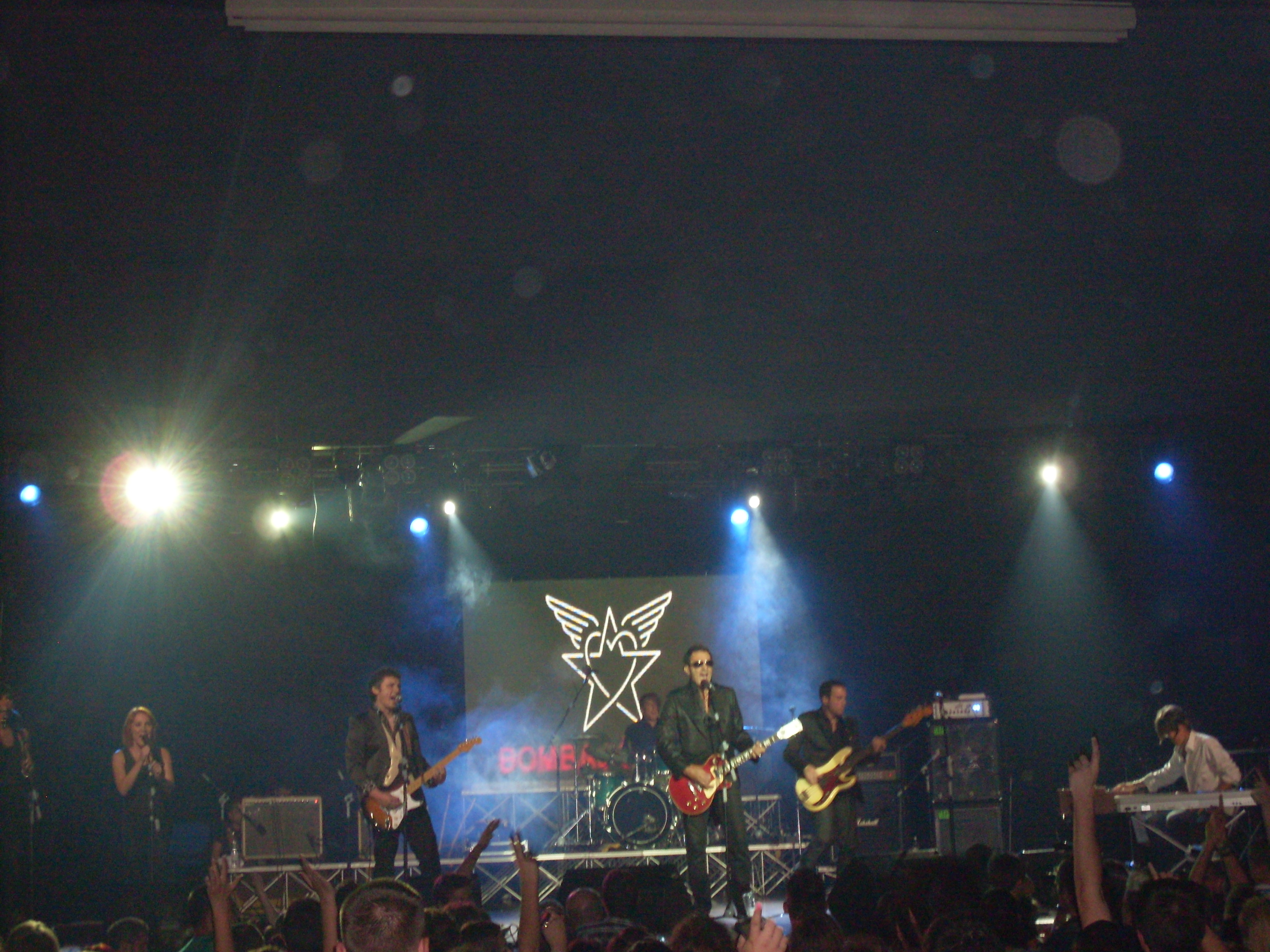 Bombaj Štampa live in Sarajevo